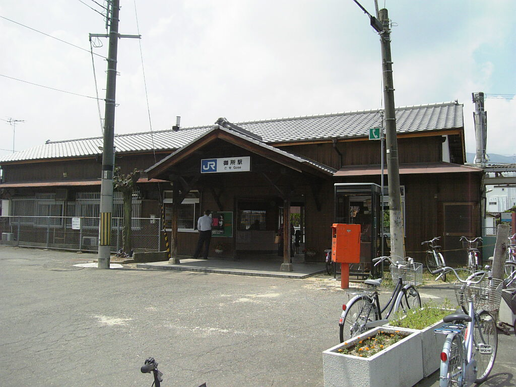 JR御所駅舎